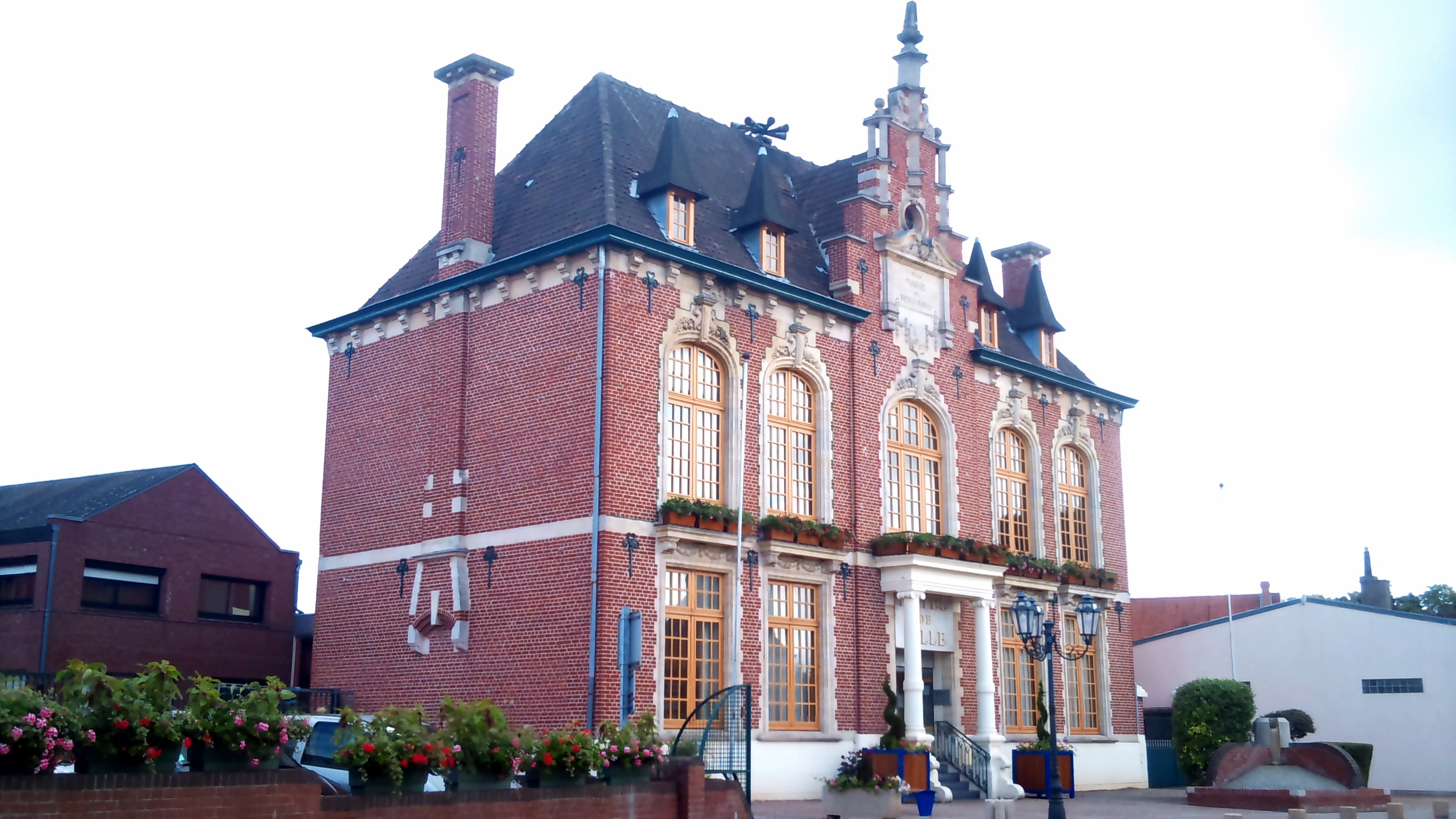 Rouvroy - Mairie